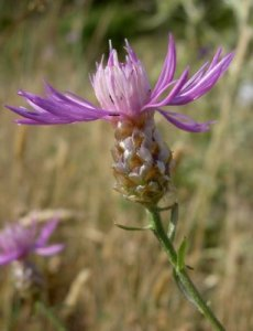 Centaurea alba subsp. costae (Willk.) Dostál, Jaca (Huesca, Spain)